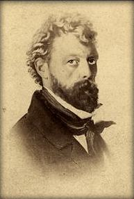 Ignác (Hynek) Umlauf (1821-1851)